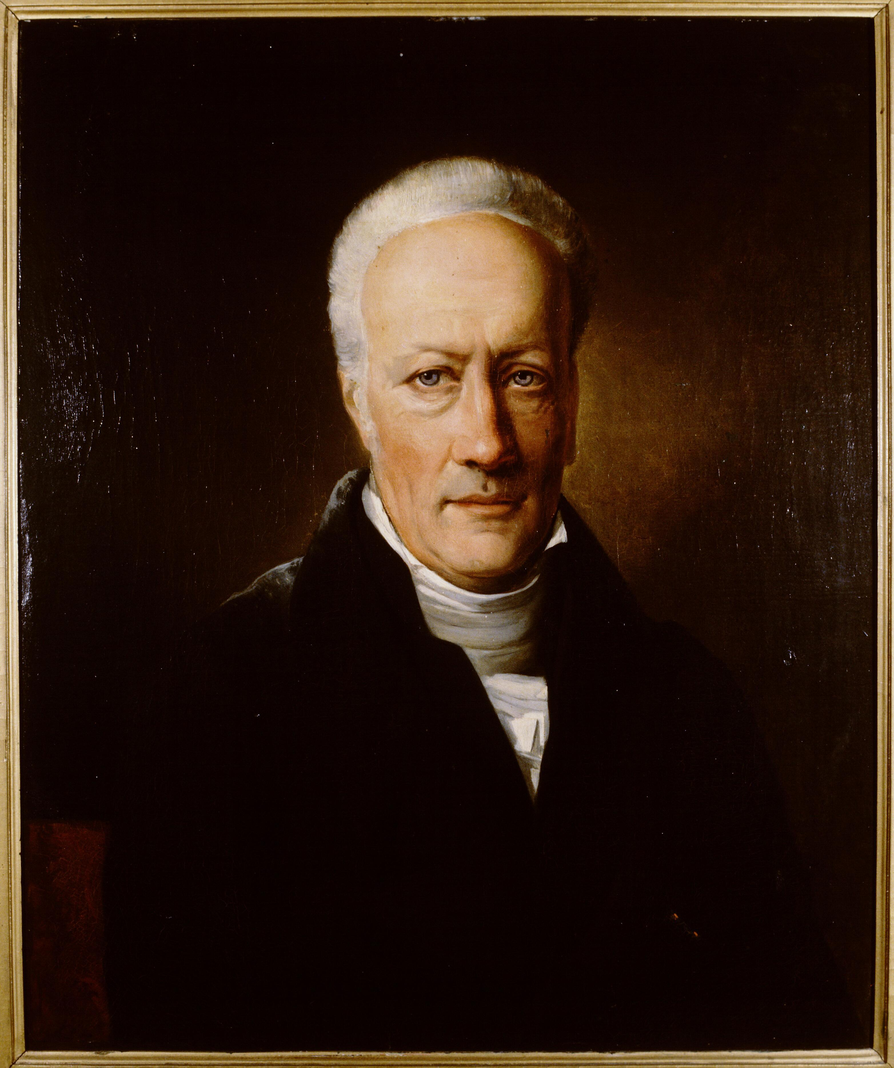 Portret van Andries Adolf Deutz van Assendelft (1764-1833)